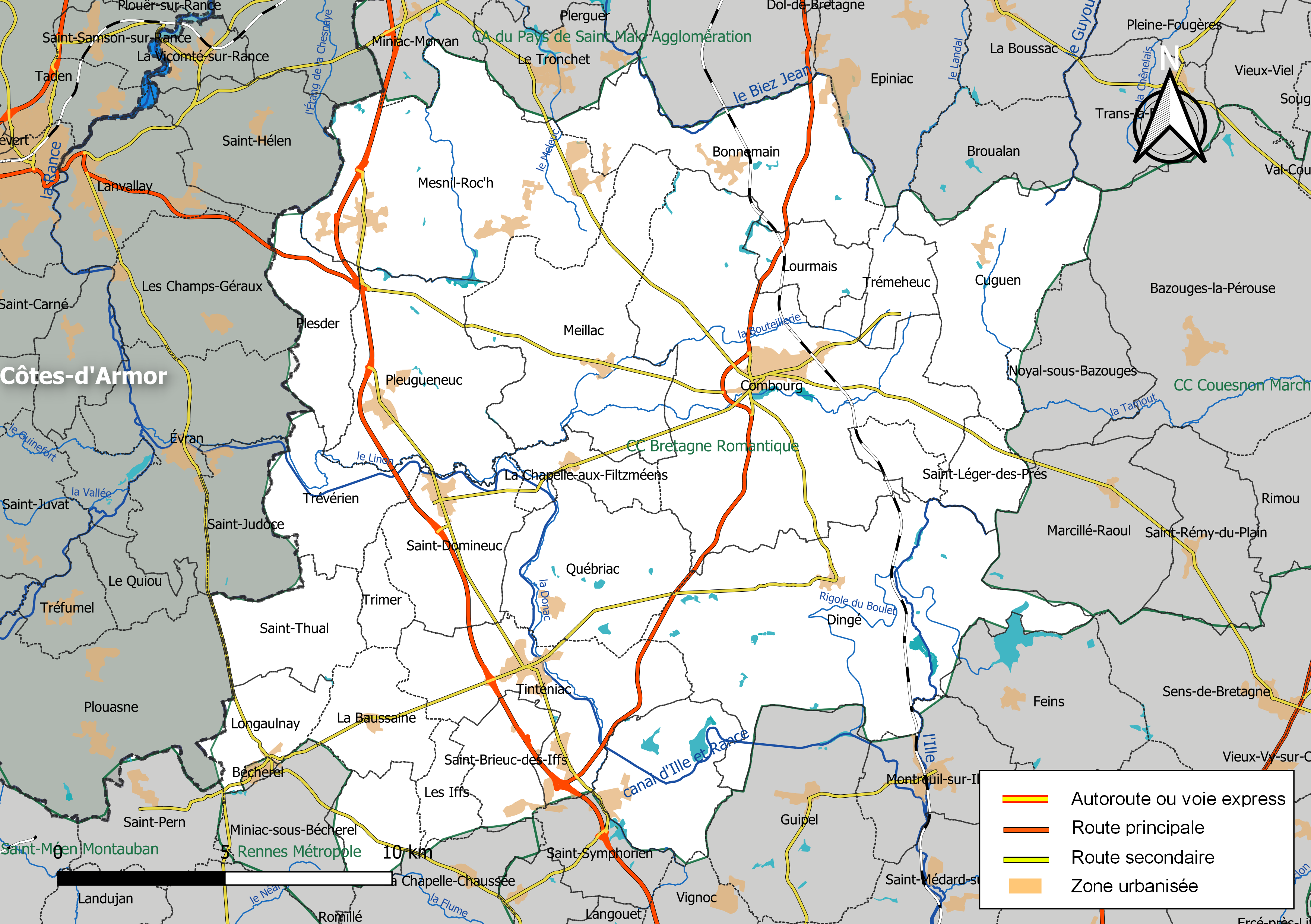 Carte géographique de la Communauté de communes Bretagne Romantique, département d'Ille-et-Vilaine, France. Composition au 1er janvier 2019.